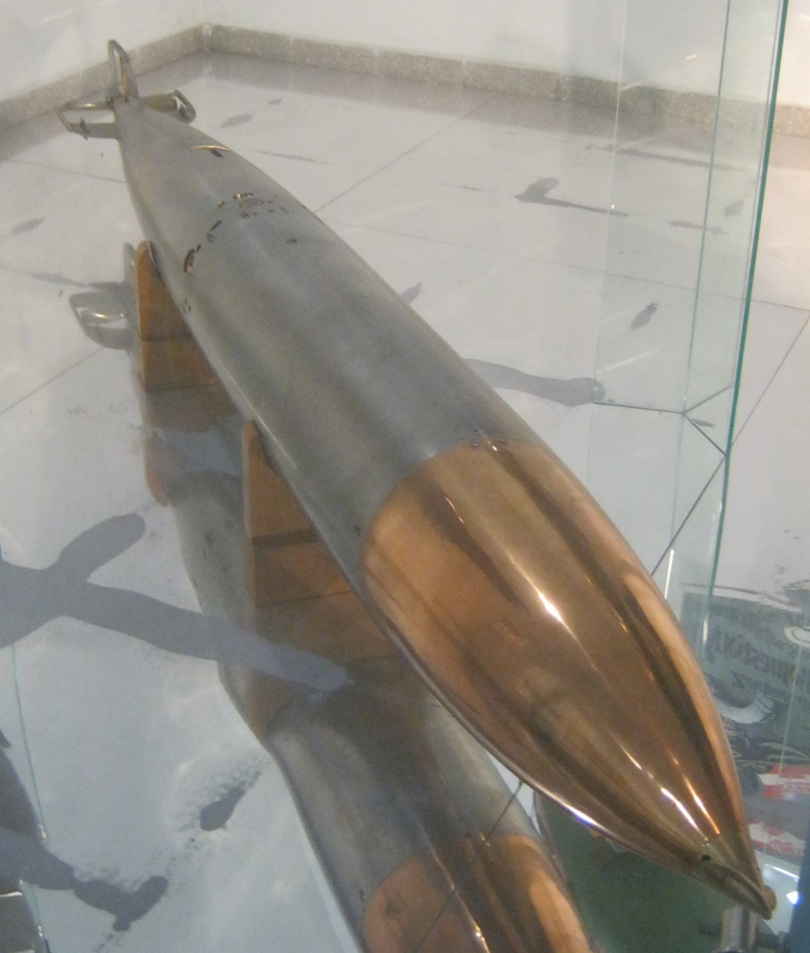 in Heeresgeschichtliches Museum Wien